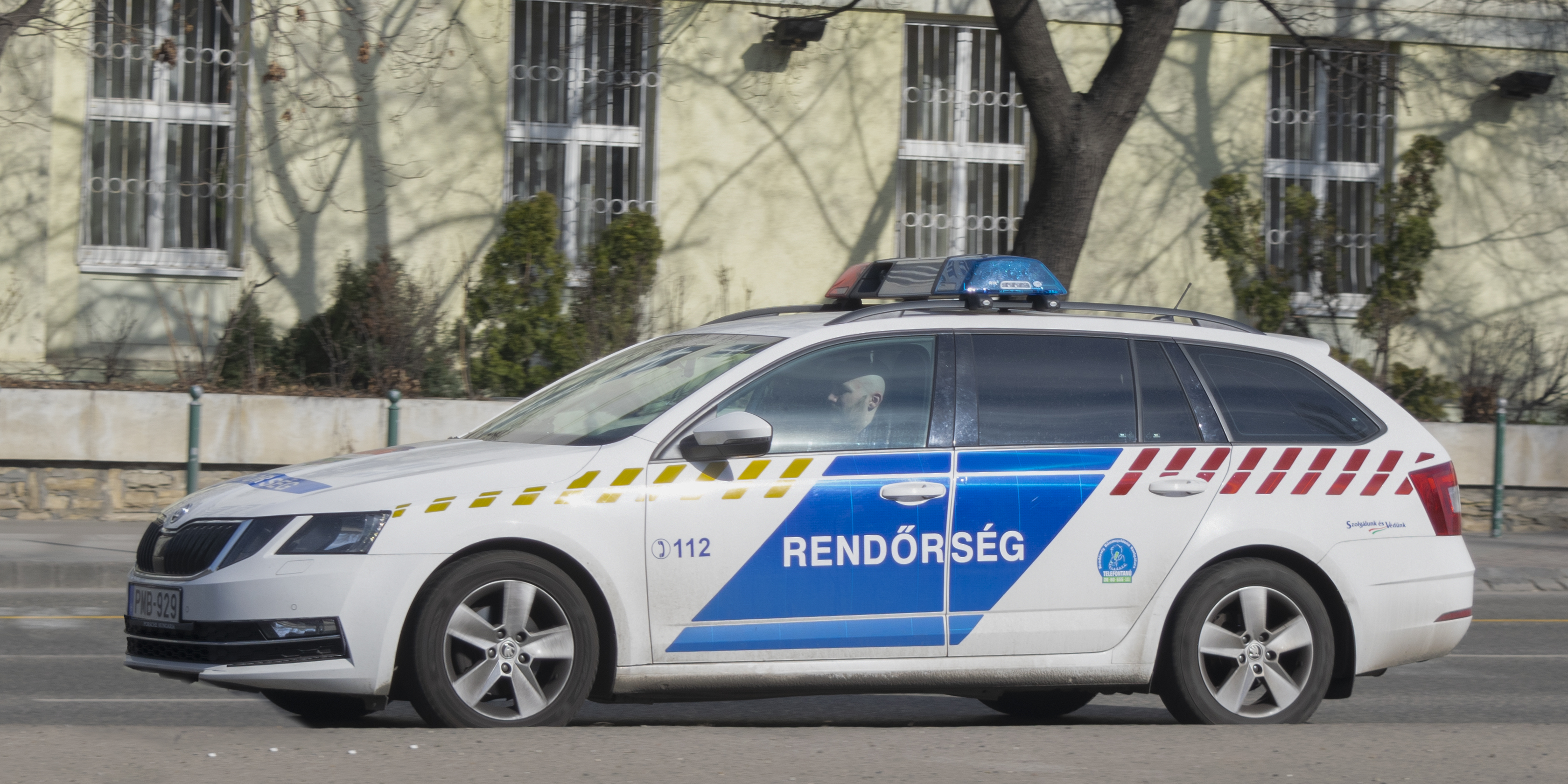 Skoda Octavia III. járőrautó